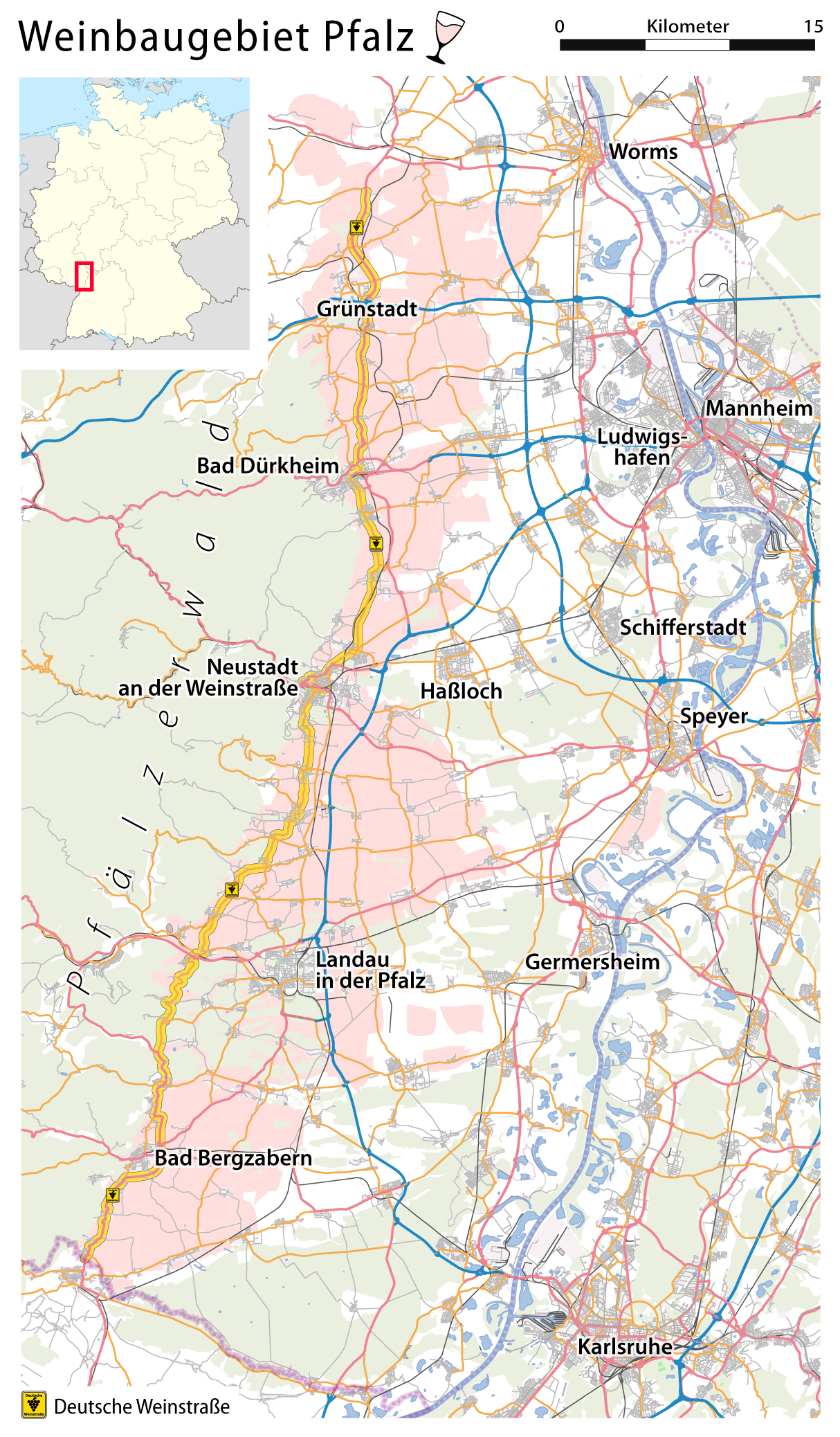 Karte vom Weinbaugebiet Pfalz